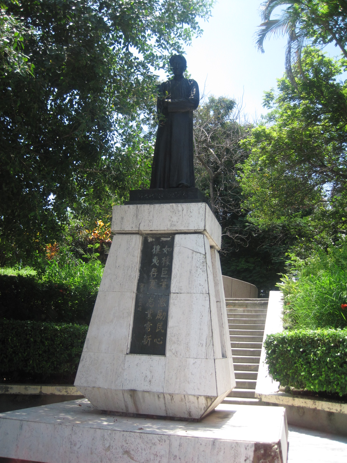 中文（台灣）: 台南公園連雅堂銅像。